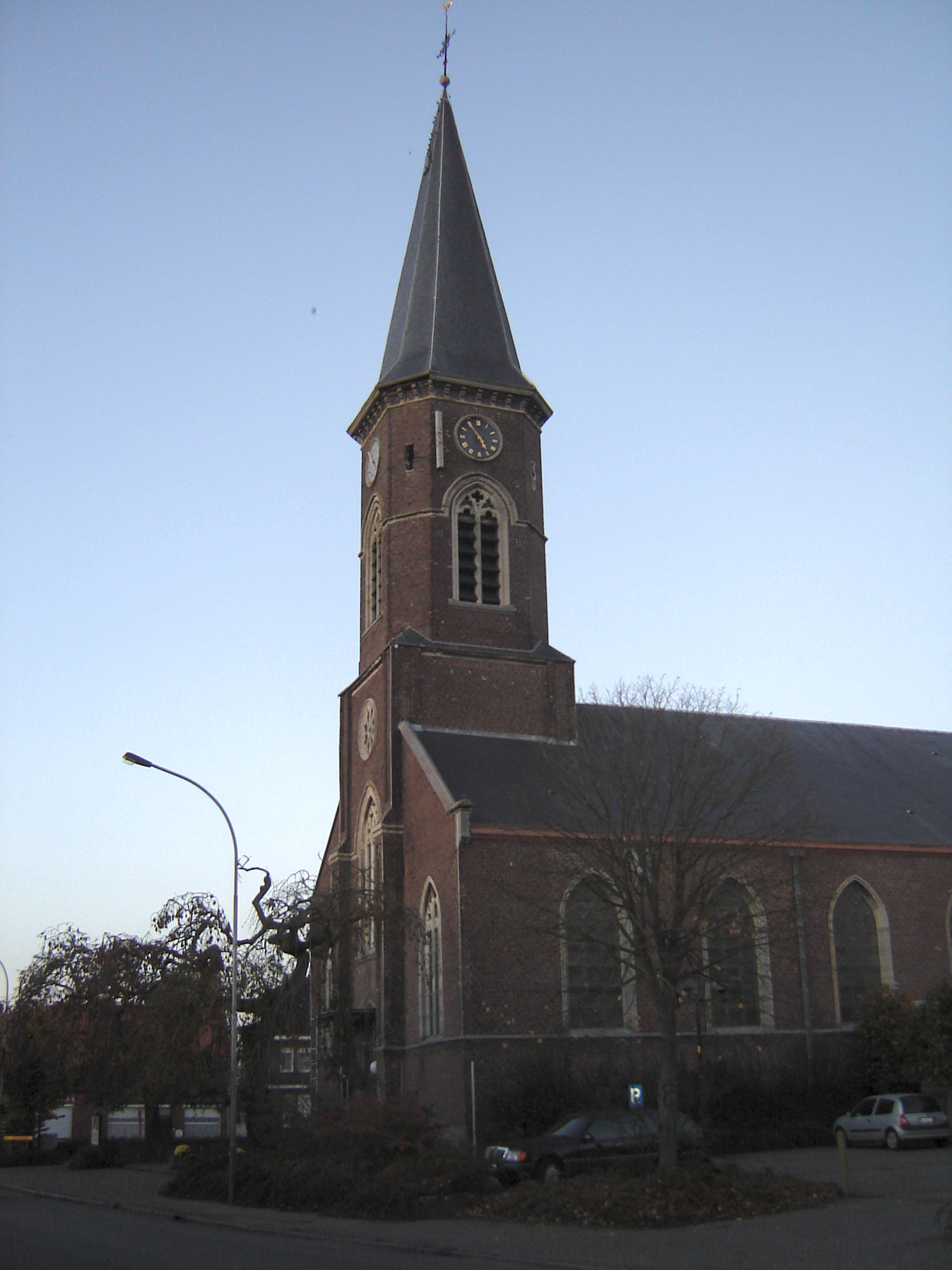 Sint-Antoniuskerk in Ingooigem. Saint Antonius Church in Ingooigem in Anzegem, West-Flanders, Belgium